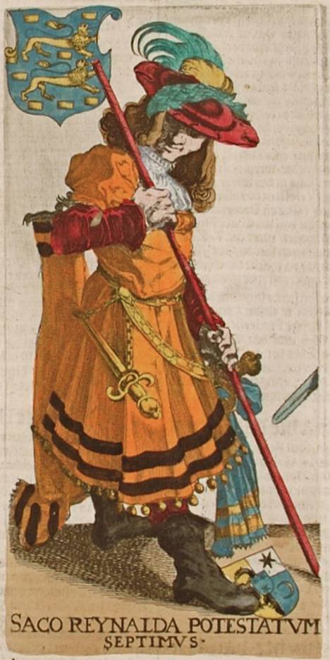 Saco Reinalda, zevende potestaat van Friesland. Afbeelding uit Chroniqve van Vrieslant door Pierius WInsemius uitgegeven te Franeker 1622.